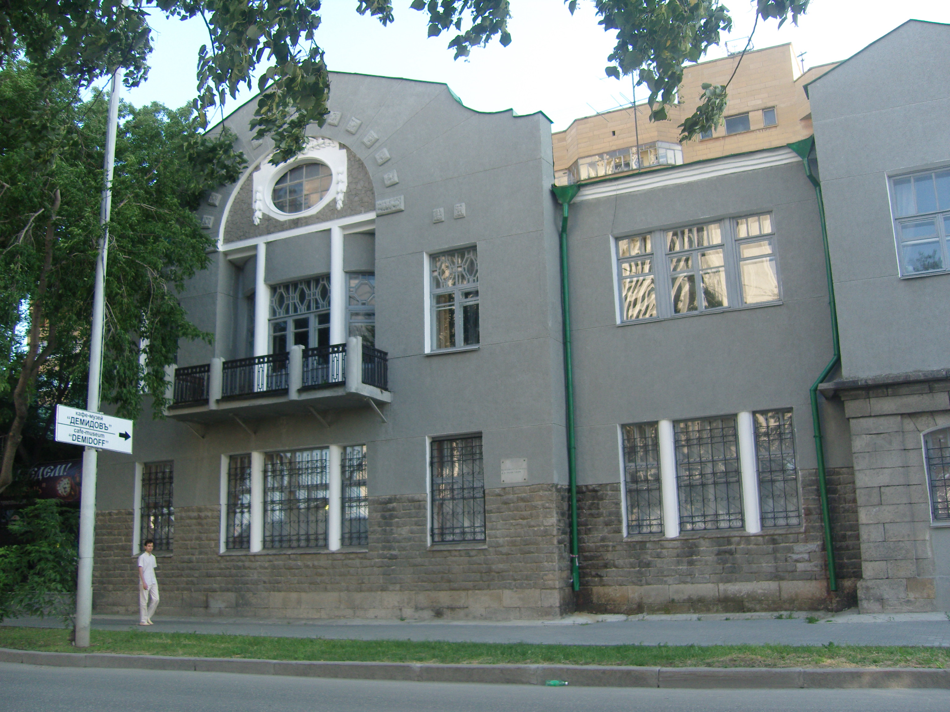 Дом Петровых.